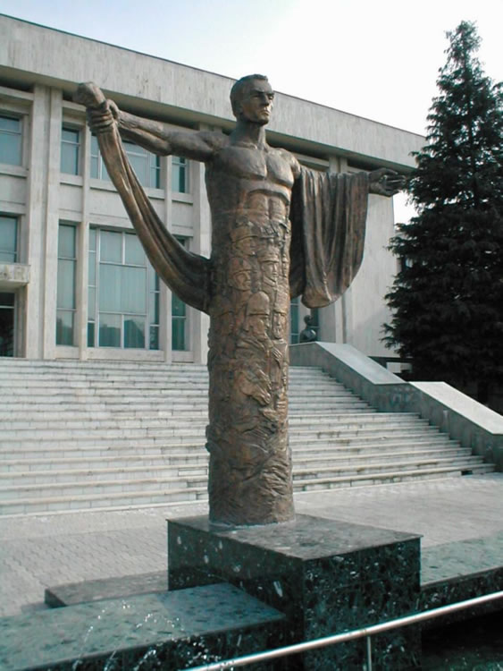 Monumentul ostasului Roman